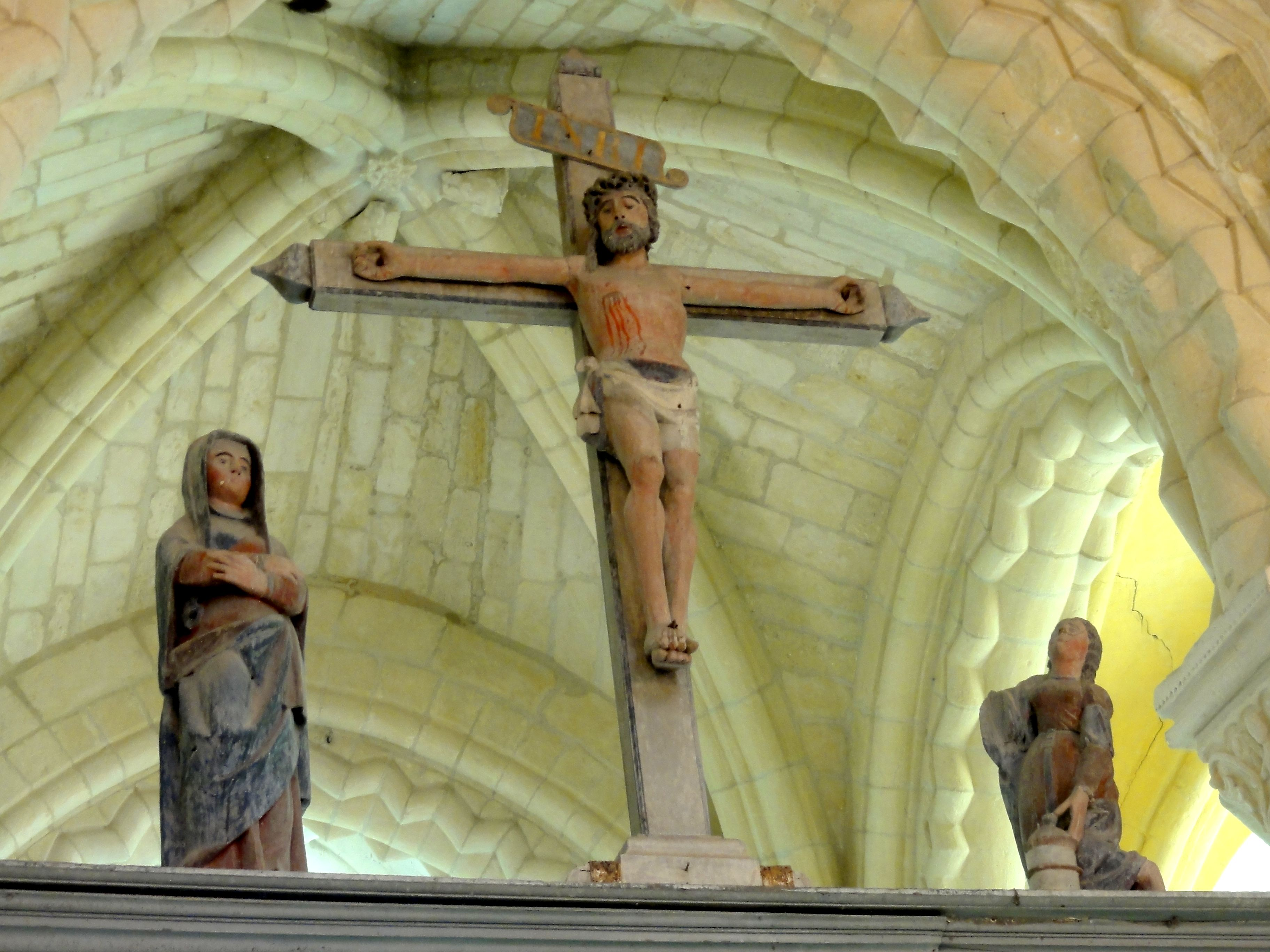 Poutre de gloire classée M.H.